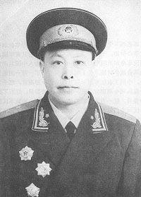 谢有法中将1955年授衔照